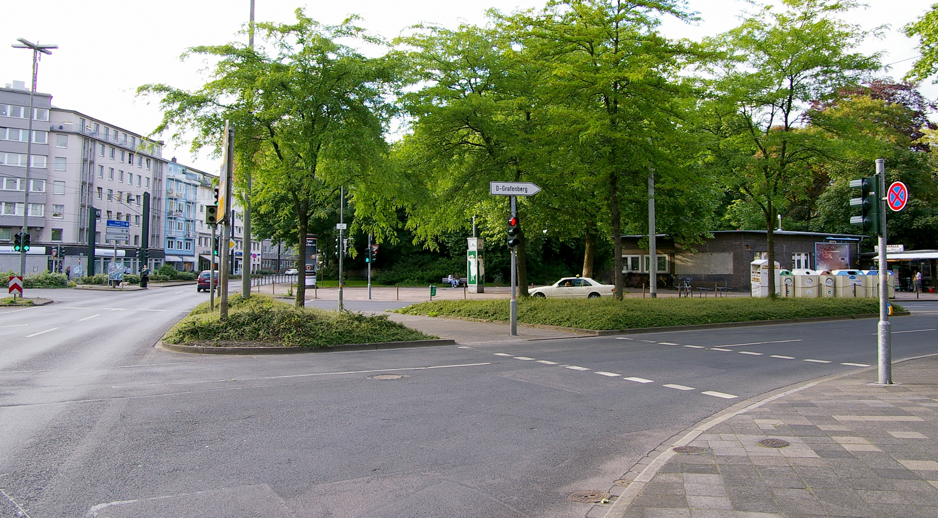 Brehmstraße und Brehmplatz in Düsseldorf mit Eingang zum Zoopark